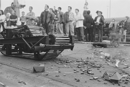 BBM-Panzer überrollt gesprengte LEGO-Stadt bei I.a.C.E., documenta IX—Stadtprogramm, Kassel